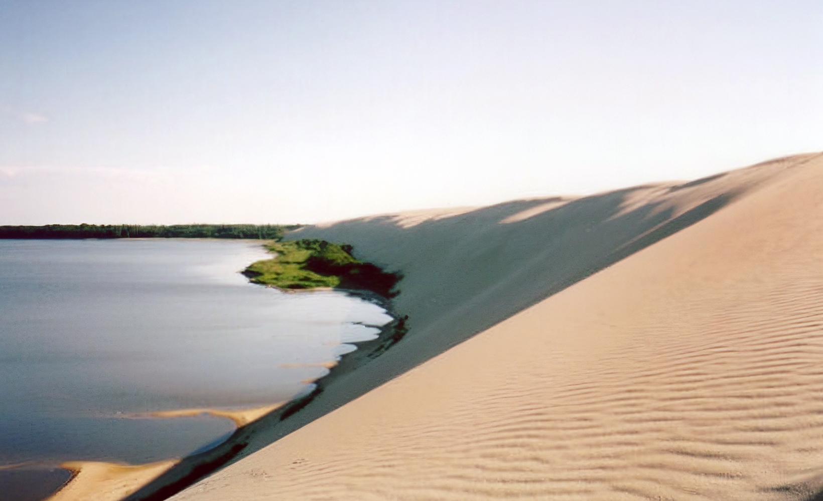 Autoriaus nuotrauka, 1997.07.04. Didžioji kopa prie Rusijos sienos. Jos dalis tolyn, pradedant keliais metrais iki mažo žalio iškyšuliuko mariose (mašdaug per nuotraukos vidurį vedant nuo šono), - jau Kaliningrado srityje. Nuotrauka gali būti platinama pagal GFDL licenciją.